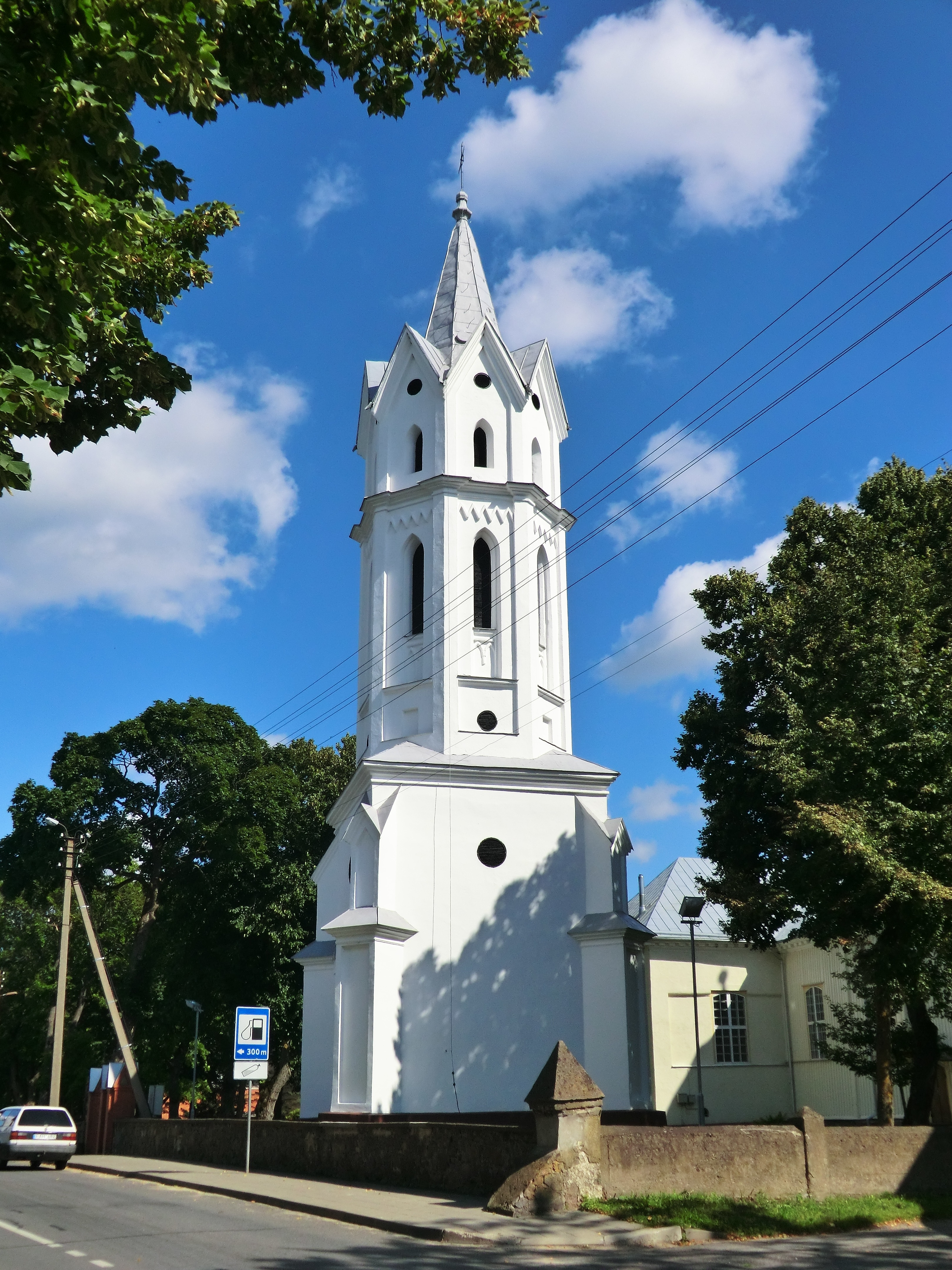 Svėdasai, Lithuania